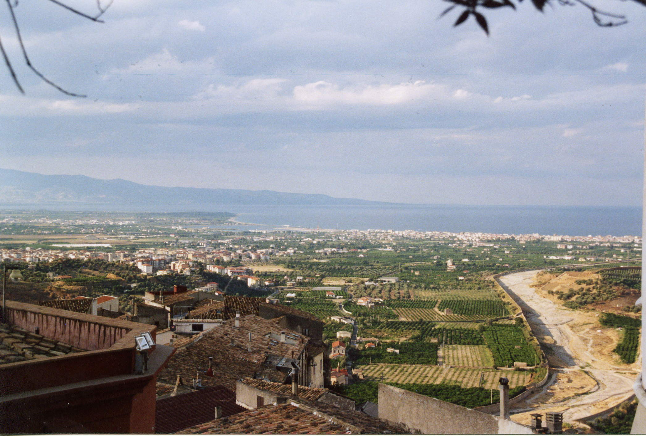 Golfo di Corigliano,scattata da Freccia Rocco.